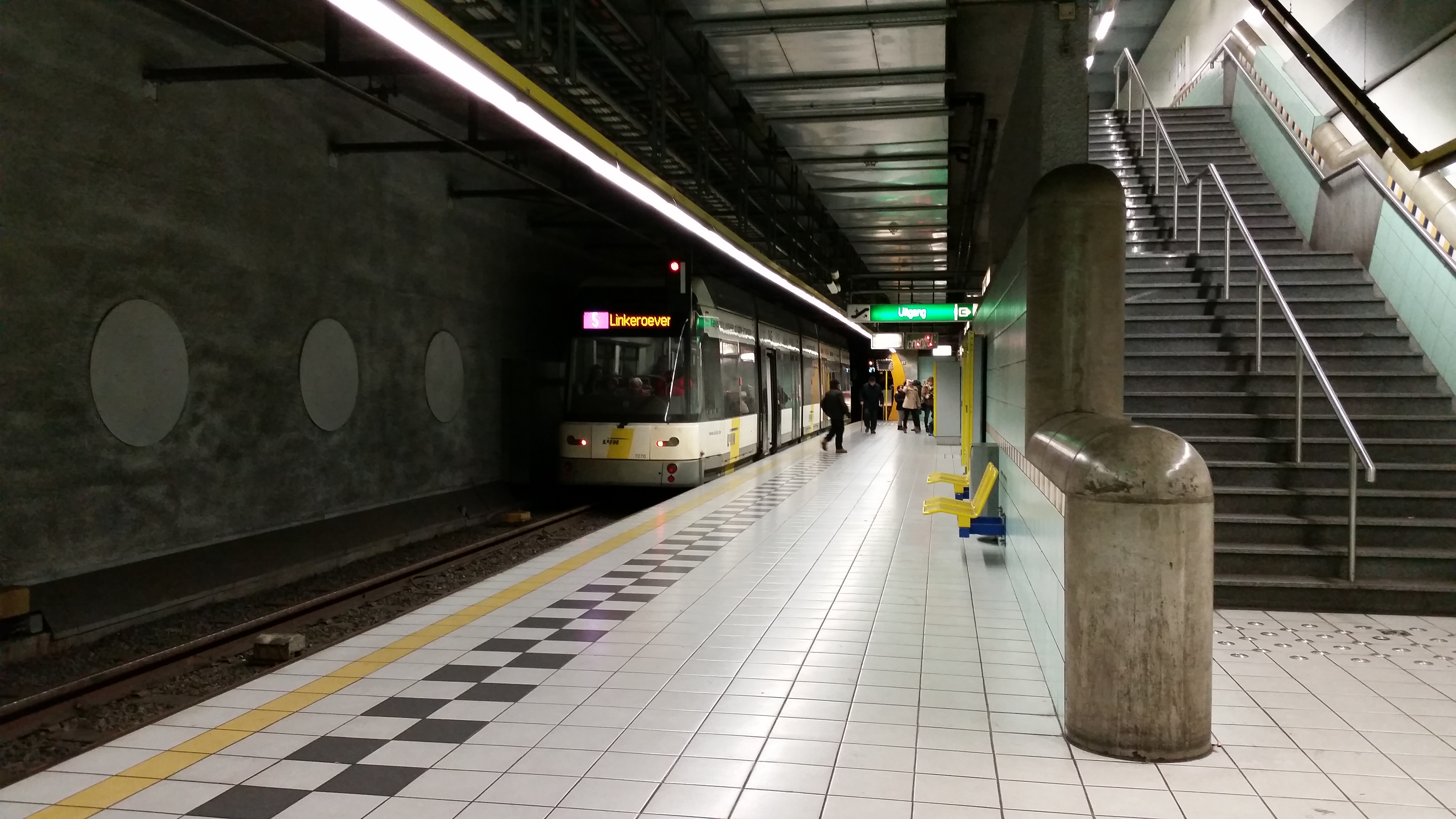 Tramvai HermeLijn al liniei 5 în stația de premetrou Handel din Antwerpen.